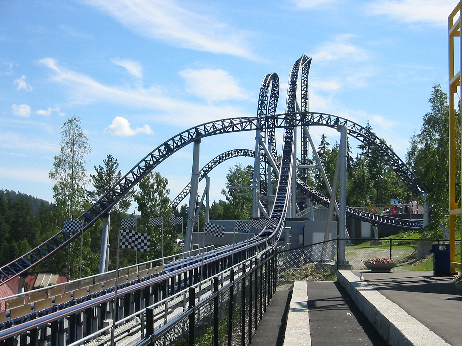 Speedmonster, Tusenfryd